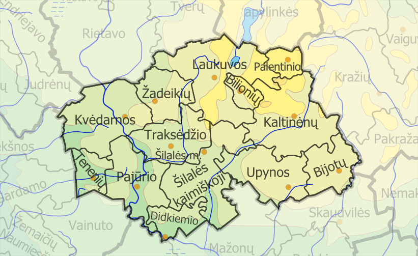 Padaryta iš :image:LietuvosSeniunijos.png